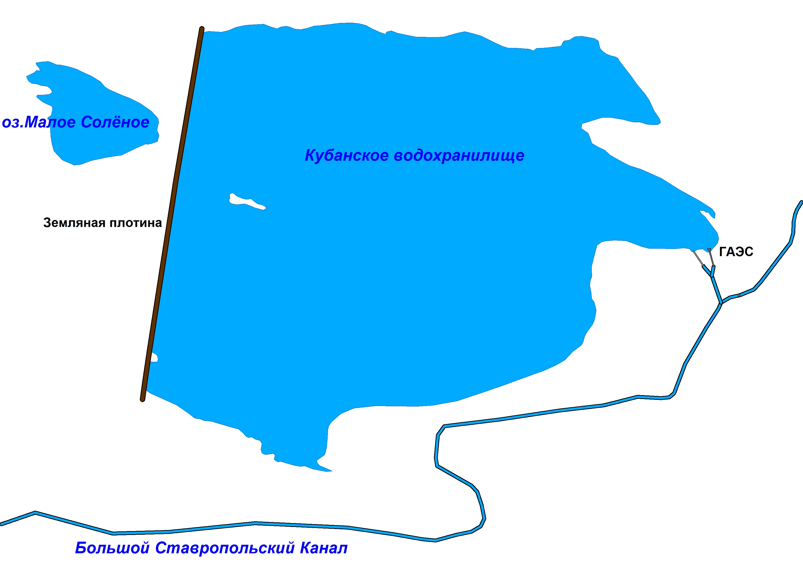 Общий план сооружений Кубанской ГАЭС